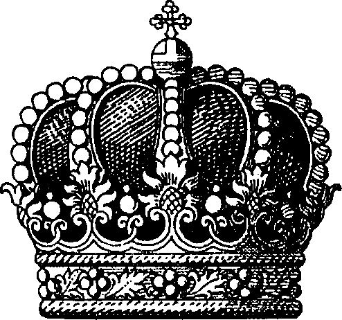 "Fig. 3. Herzogskrone [Krone der Prinzen aus kgl. Häusern und der Erbgroßherzoge.] Sie zeigt dieselbe Bildung wie die vorhergehende, nur wird der Raum unter den Spangen von der Mütze vollkommen ausgefüllt. Gleichwertig aber älter ist der Herzogshut (Fig. 42). [...] Die Herzogskrone wird derzeit nur von Schaumburg-Lippe im Staatswappen benützt, doch ist sie auch in einem Siegel des Fürsten von Waldeck-Pyrmont nachzuweisen."